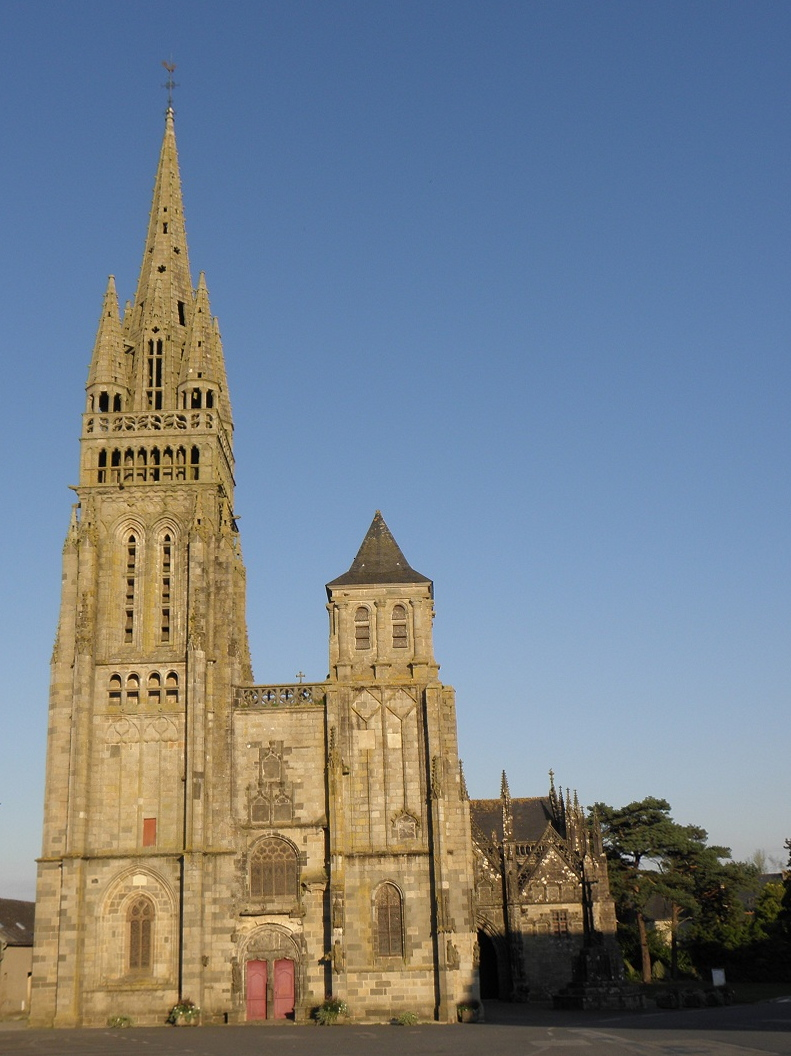 Façade occidentale de la basilique Notre-Dame du Folgoët (29).